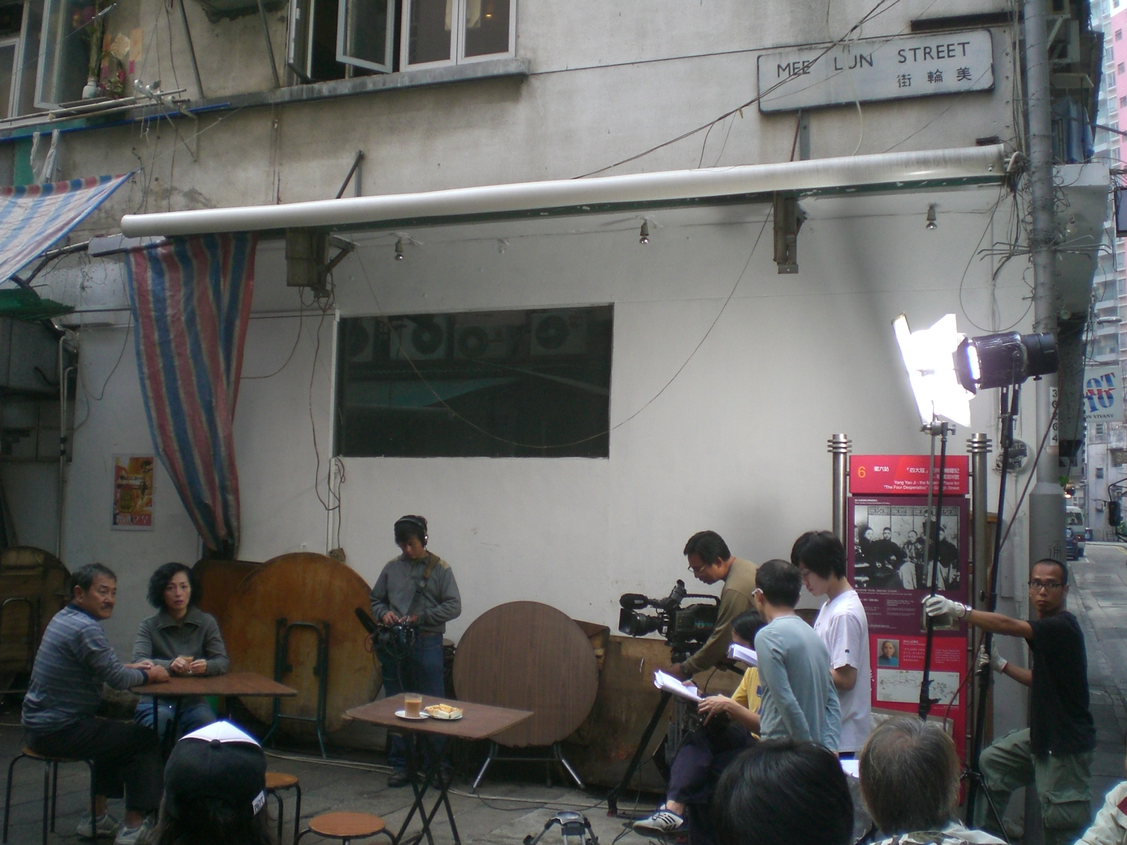 Dai pai dong 大牌檔, 上環美輪街近歌賦街及九如坊